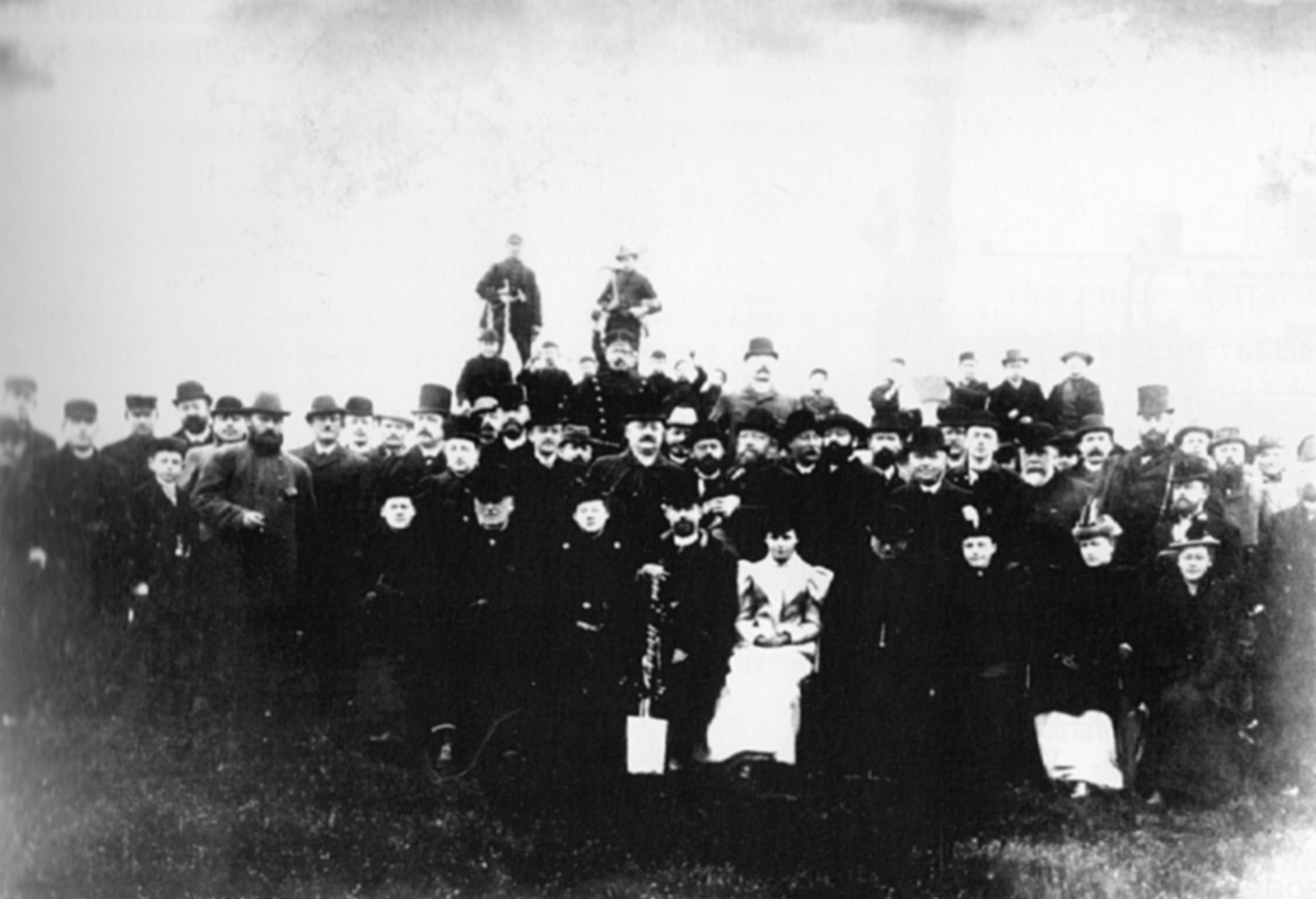 Erster Spatenstich zur Bahnstrecke Bentheim–Neuenhaus der Bentheimer Kreisbahn am 14. März 1895